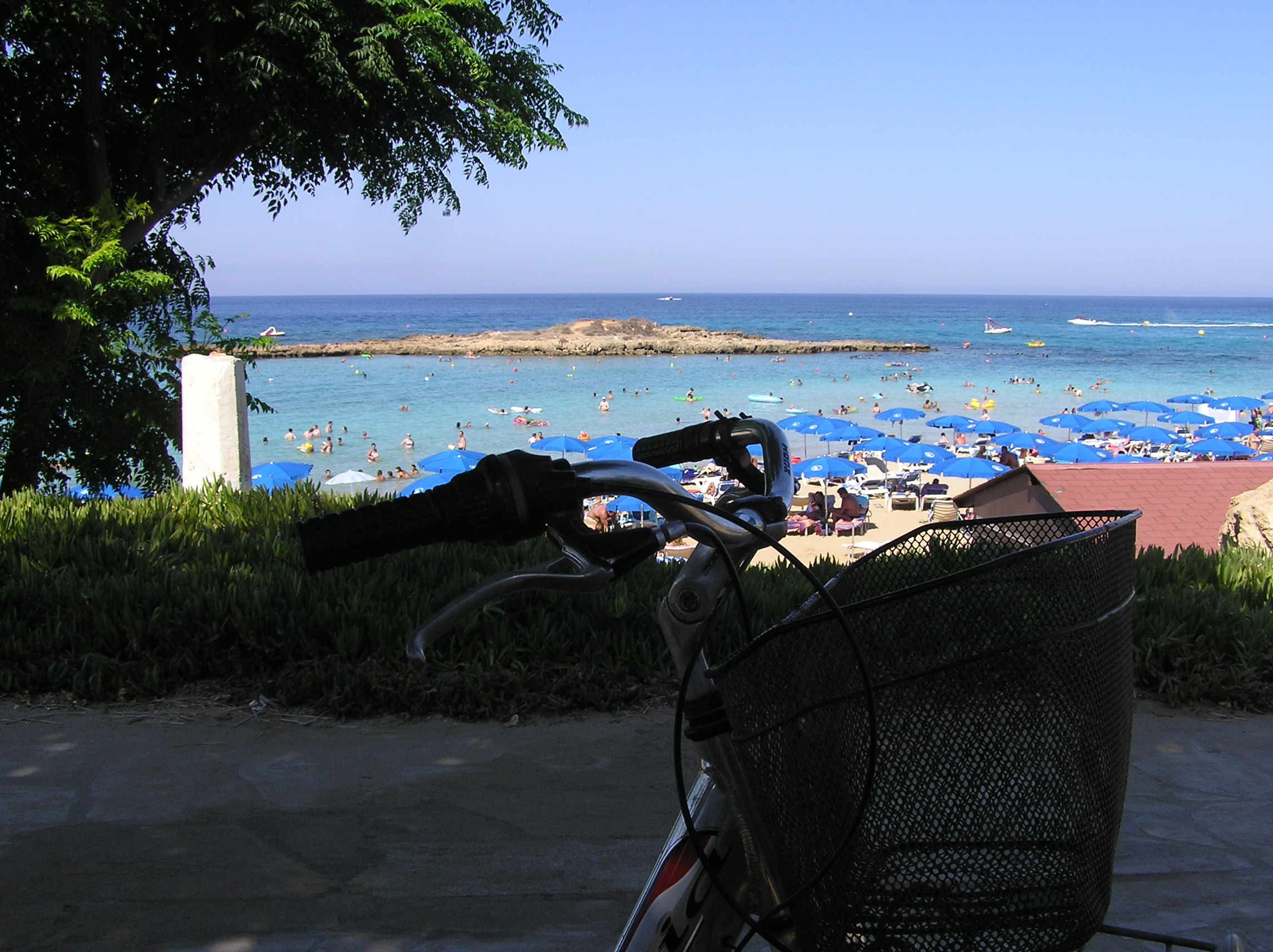 Fig Tree Bay - Protaras, Cyprus